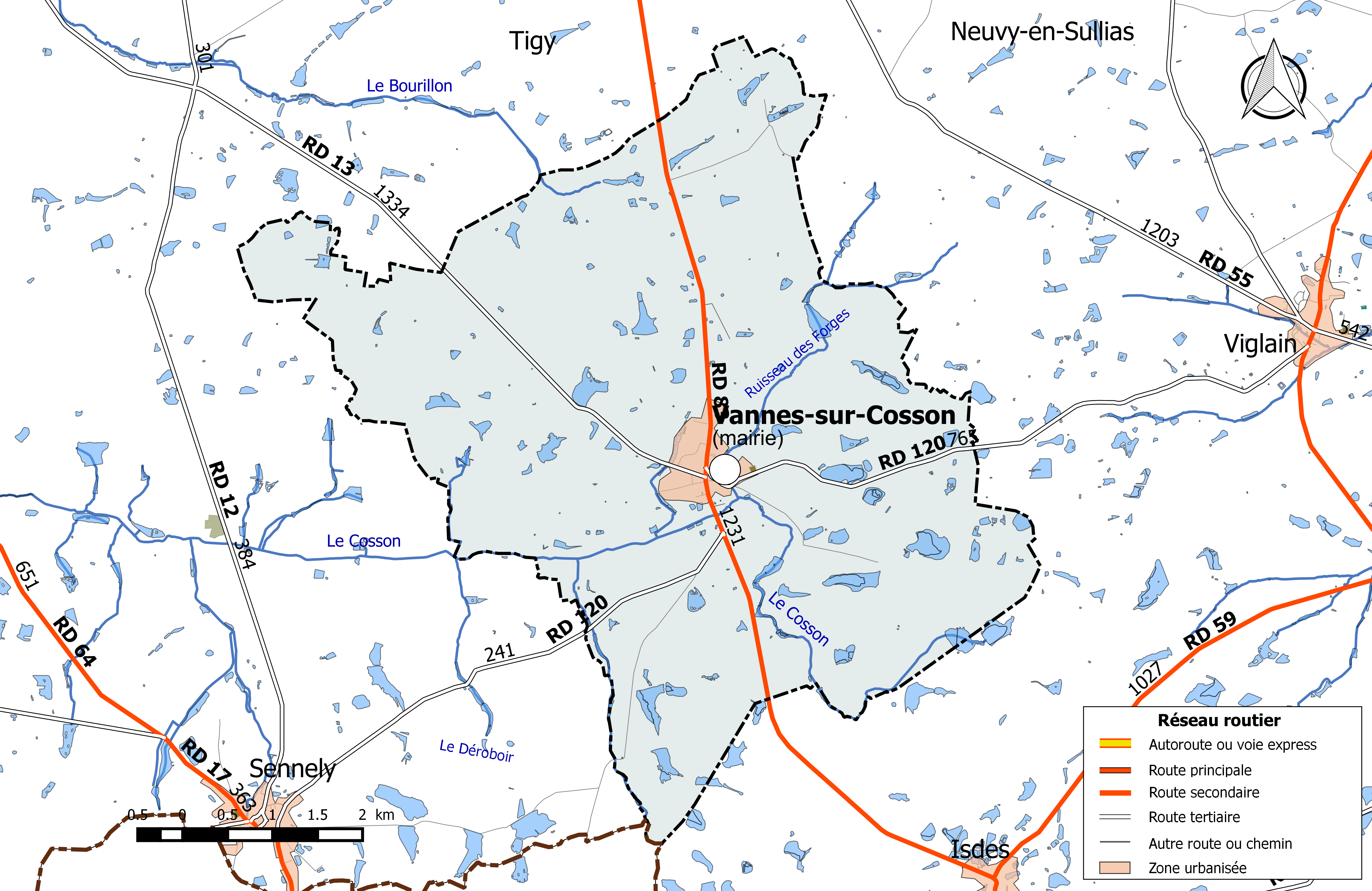 Carte du réseau routier de la commune de Vannes-sur-Cosson.